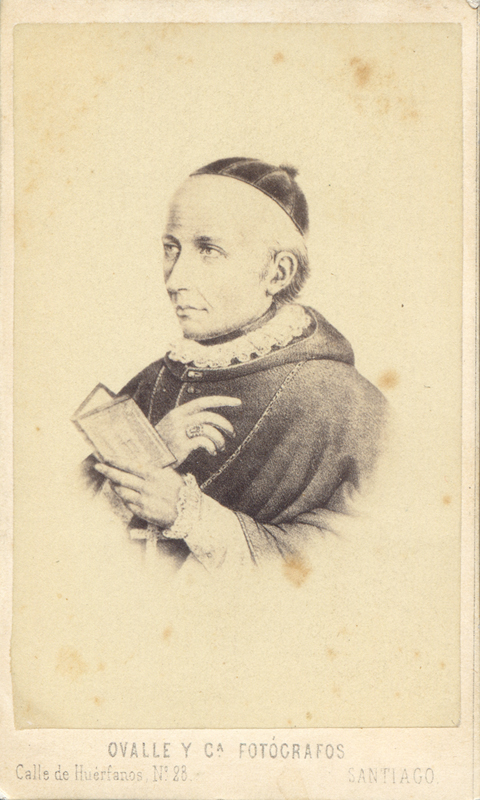 Ovalle y Ca. Fotógrafos. Manuel Vicuña y Larraín, primer arzobispo de Santiago. Santiago, s/f. Emulsión/papel. 10 x 6 cm. Colección Fotografía. En depósito. Nº de inventario 1197. El 23 de junio de 1840, el Papa Gregorio XVI nombró como primer Arzobispo de Santiago a monseñor Manuel Vicuña Larraín, quien tomó posesión del cargo el 17 de marzo de 1841. El prelado nació en Santiago en 1778 y falleció en 1843. Fue tío abuelo de Benjamín Vicuña Mackenna.